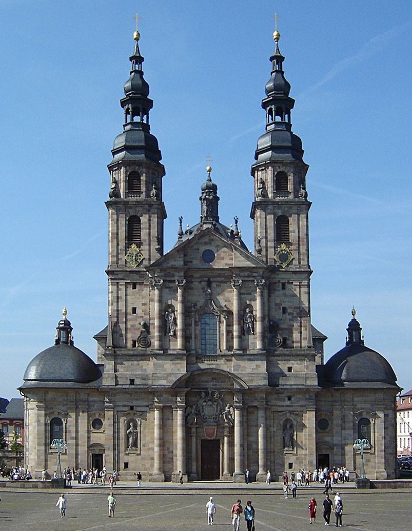 Dom Fulda. Ort: Fulda